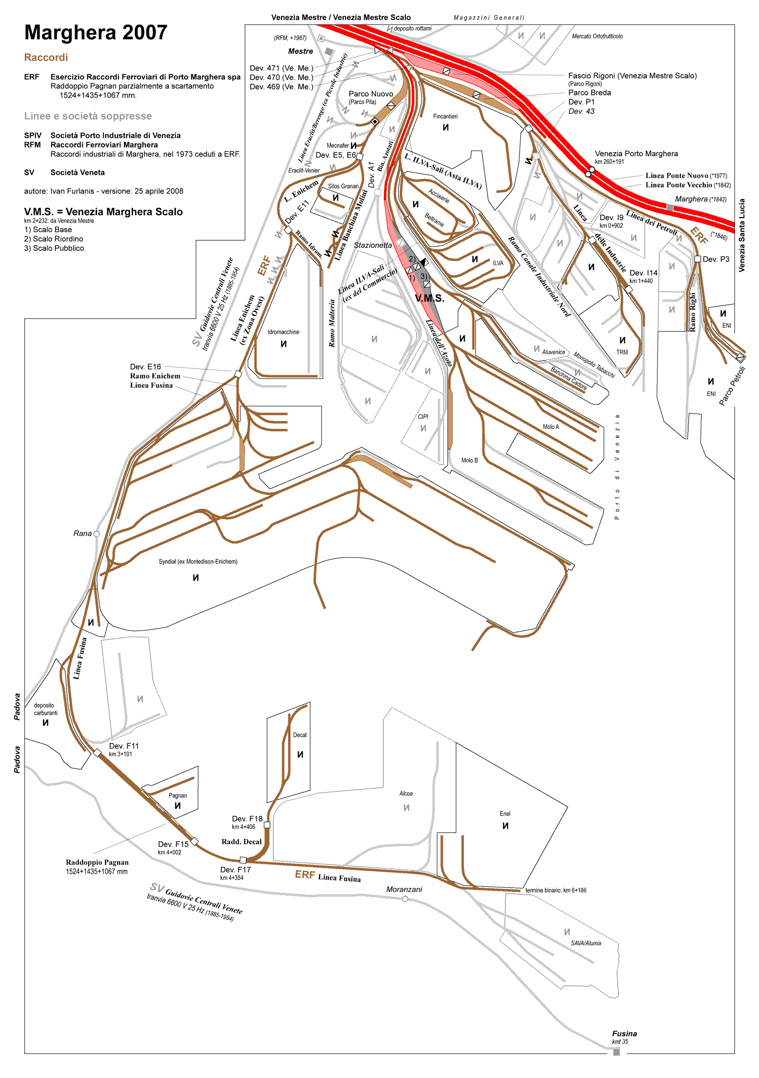 Mappa ferroviaria e tranviaria di Marghera (Venezia). Legenda.